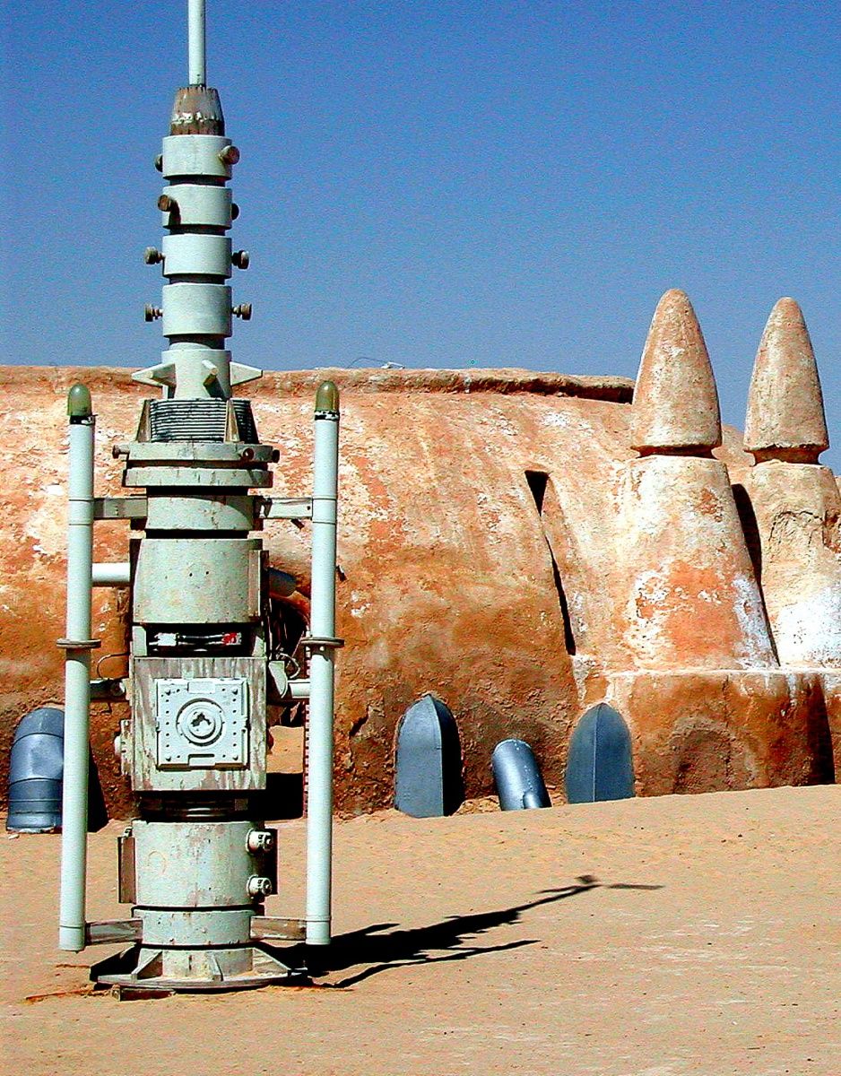 Decorado Star Wars en Túnez